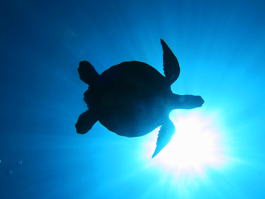 Penyu hijau